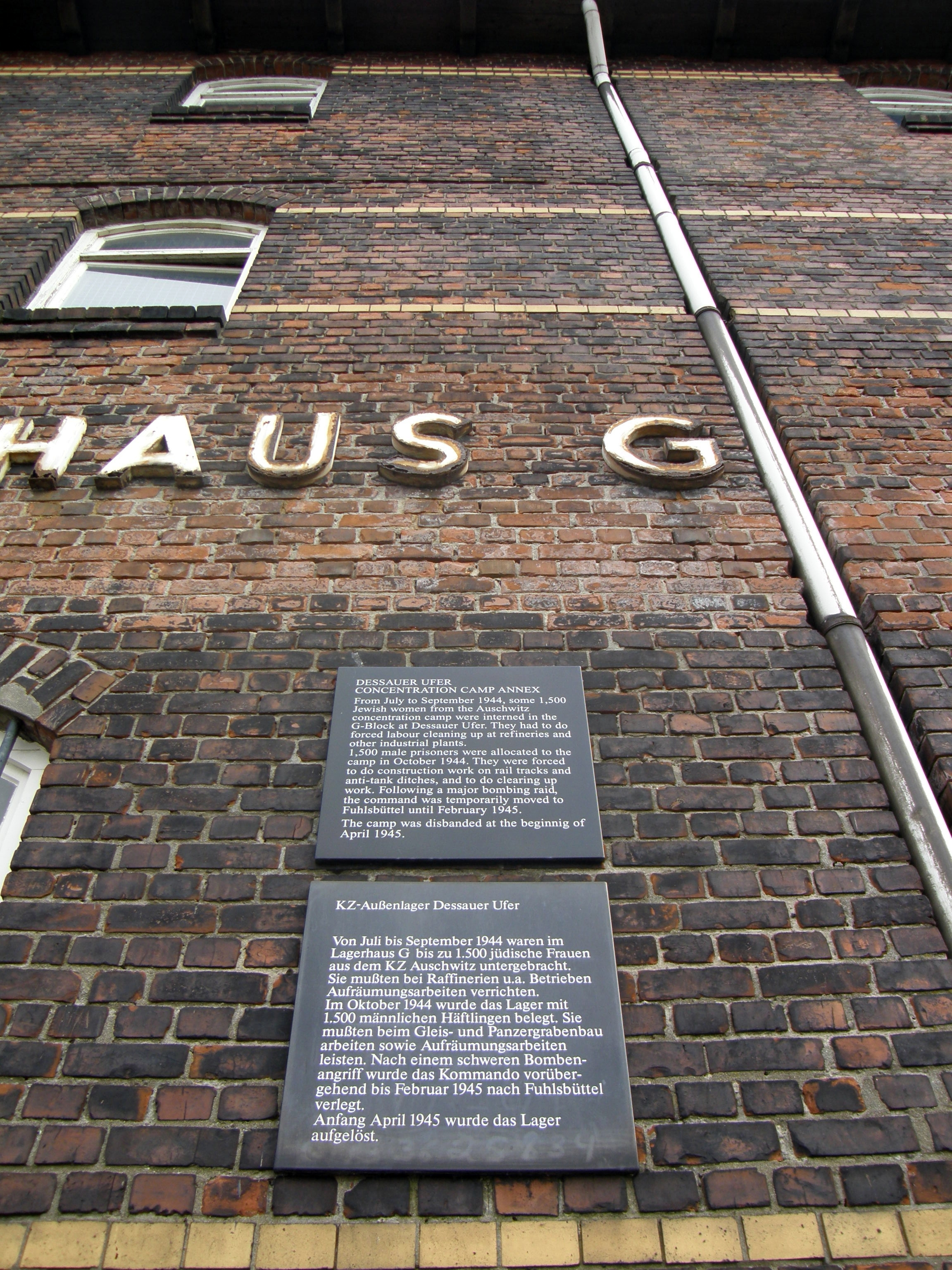 Gedenktafel am Lagerhaus G, Außenstelle des KZ Neuengamme im Hamburger Hafen, Dessauer Ufer